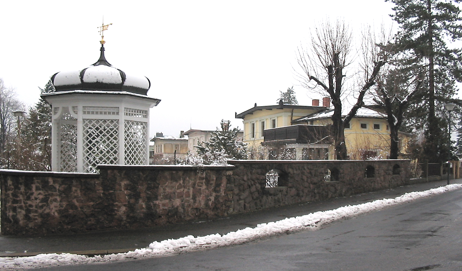 Radebeul, Villa Agnes, Pavillon mit Blick zu den ähnlichen Nachbarhäusern Villa Nizzastraße 11 und Villa Nizzastraße 9 (dahinter)